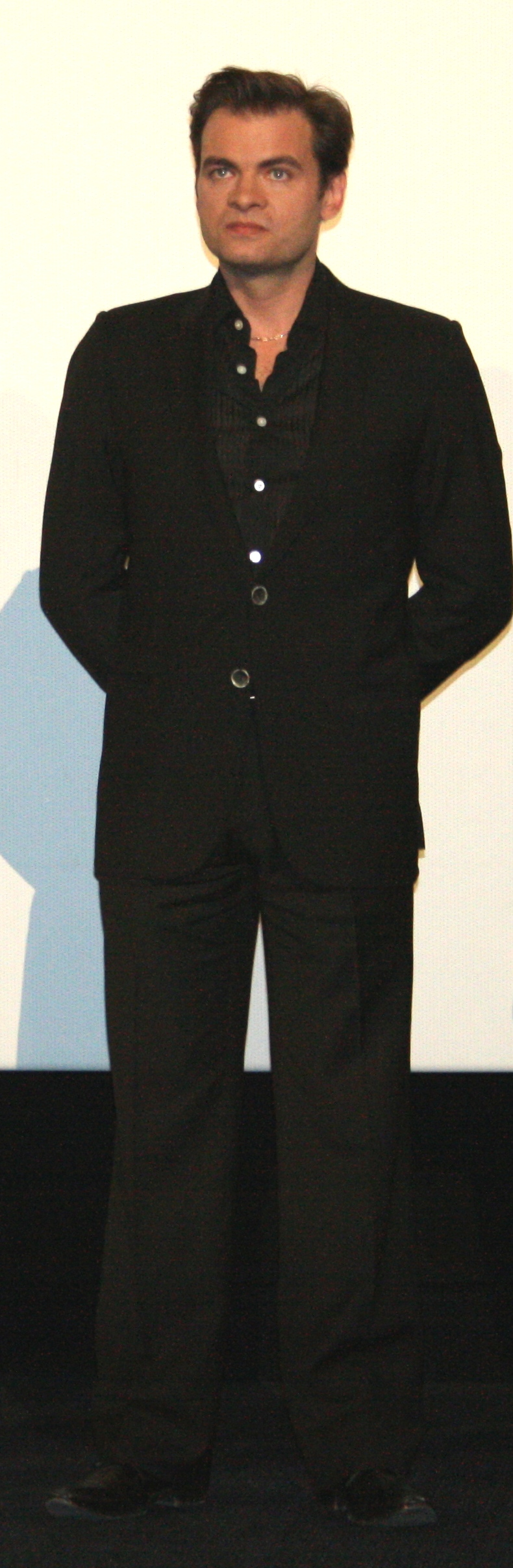 Clovis Cornillac à l'avant-première du Nouveau protocole diffusée à l'UGC Ciné Cité Bercy, à Paris.